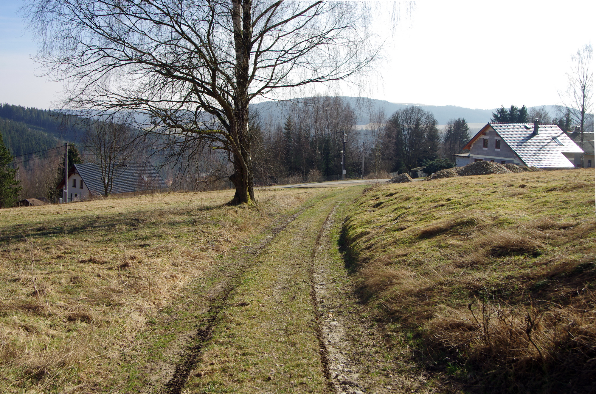 Zelená Hora (místní část Kraslic), Krušné hory, okres Sokolov